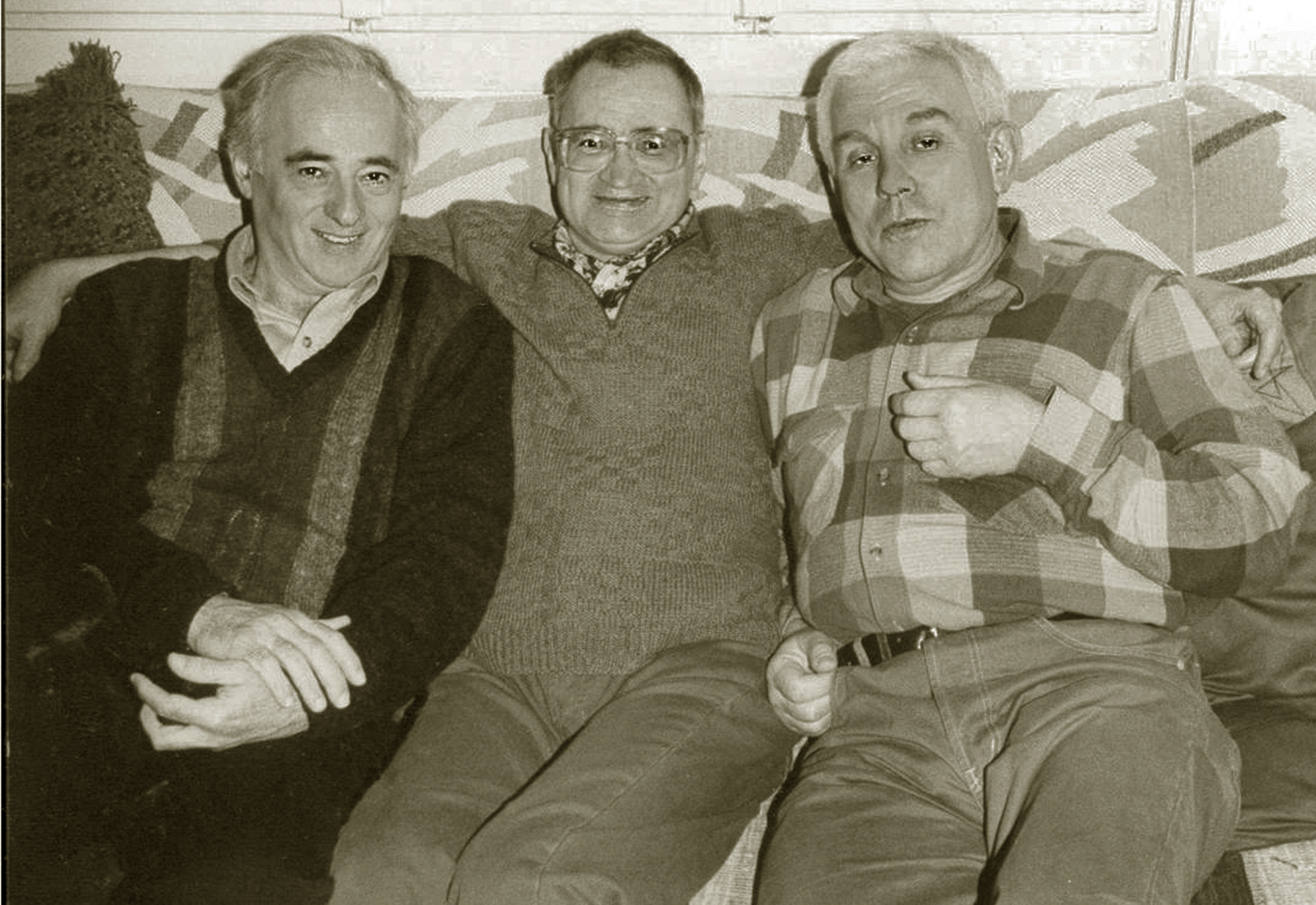 Профессоры Александр Зисельсон и Эдуард Цыбулькин